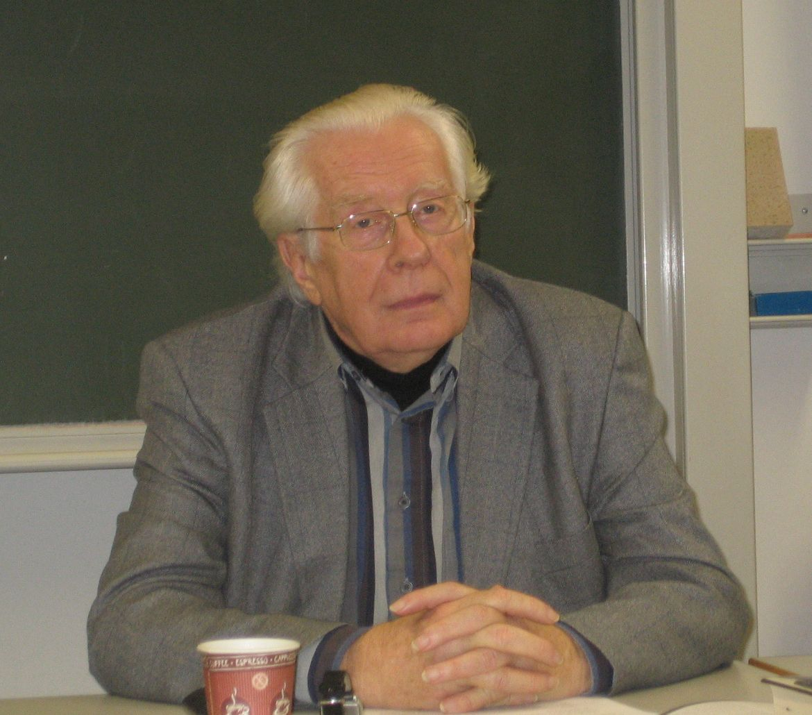 manfred weißbecker in jena am 06.12.07